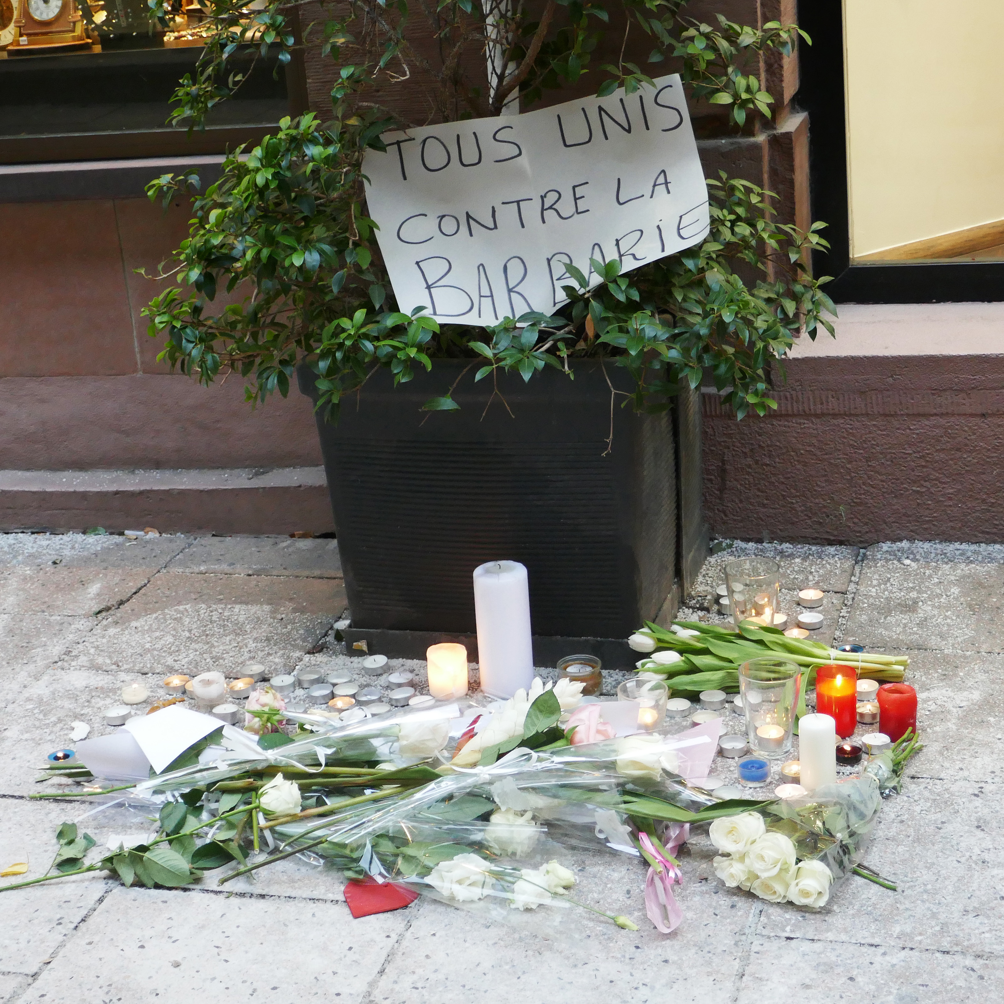 Fusillade de Strasbourg 2018 : hommages dans la rue des Orfèvres,le surlendemain.